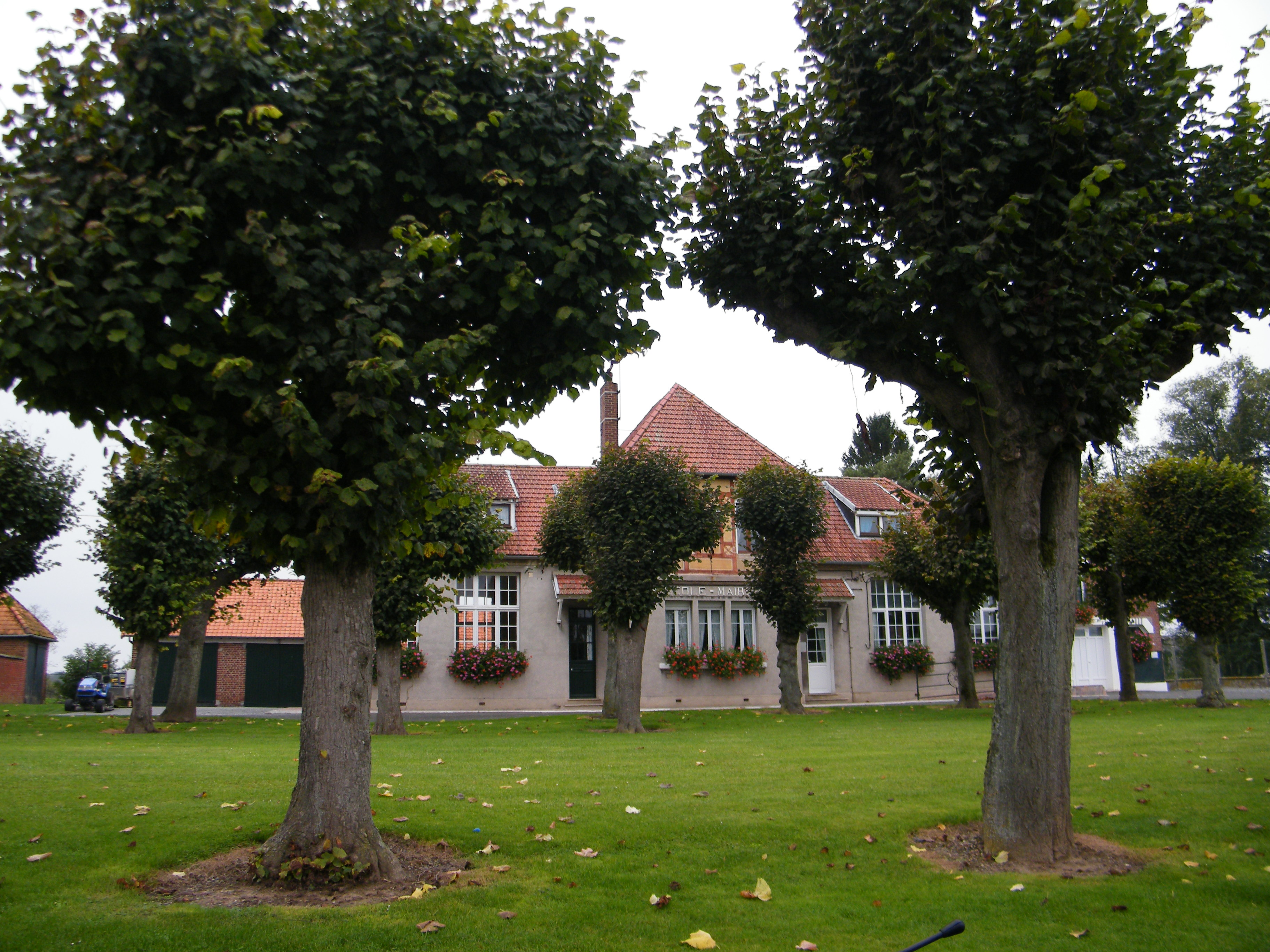 Mairie-école.